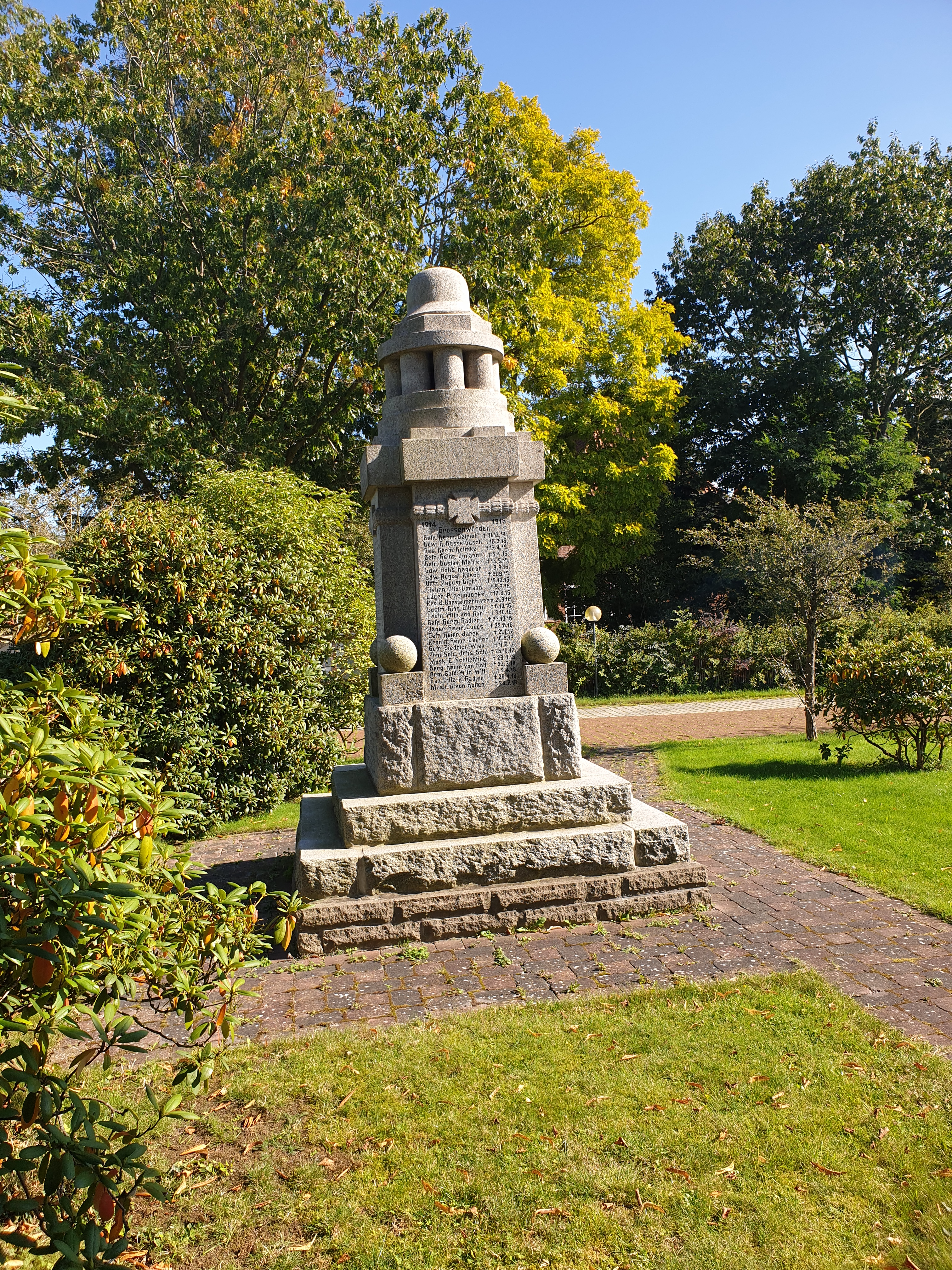 Kriegerdenkmal an der Kirche in Großenwörden (Oste), Landkreis Stade, Nds.